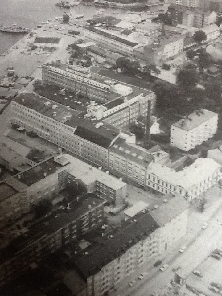 I över 46 år ledde Ericsson stora delar av sin verksamhet på Ölandsgatan, Karlskrona, Blekinge.